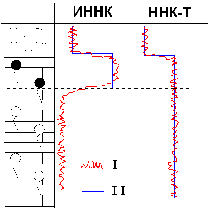 Сравнение диаграмм ИННК и ННК-Т